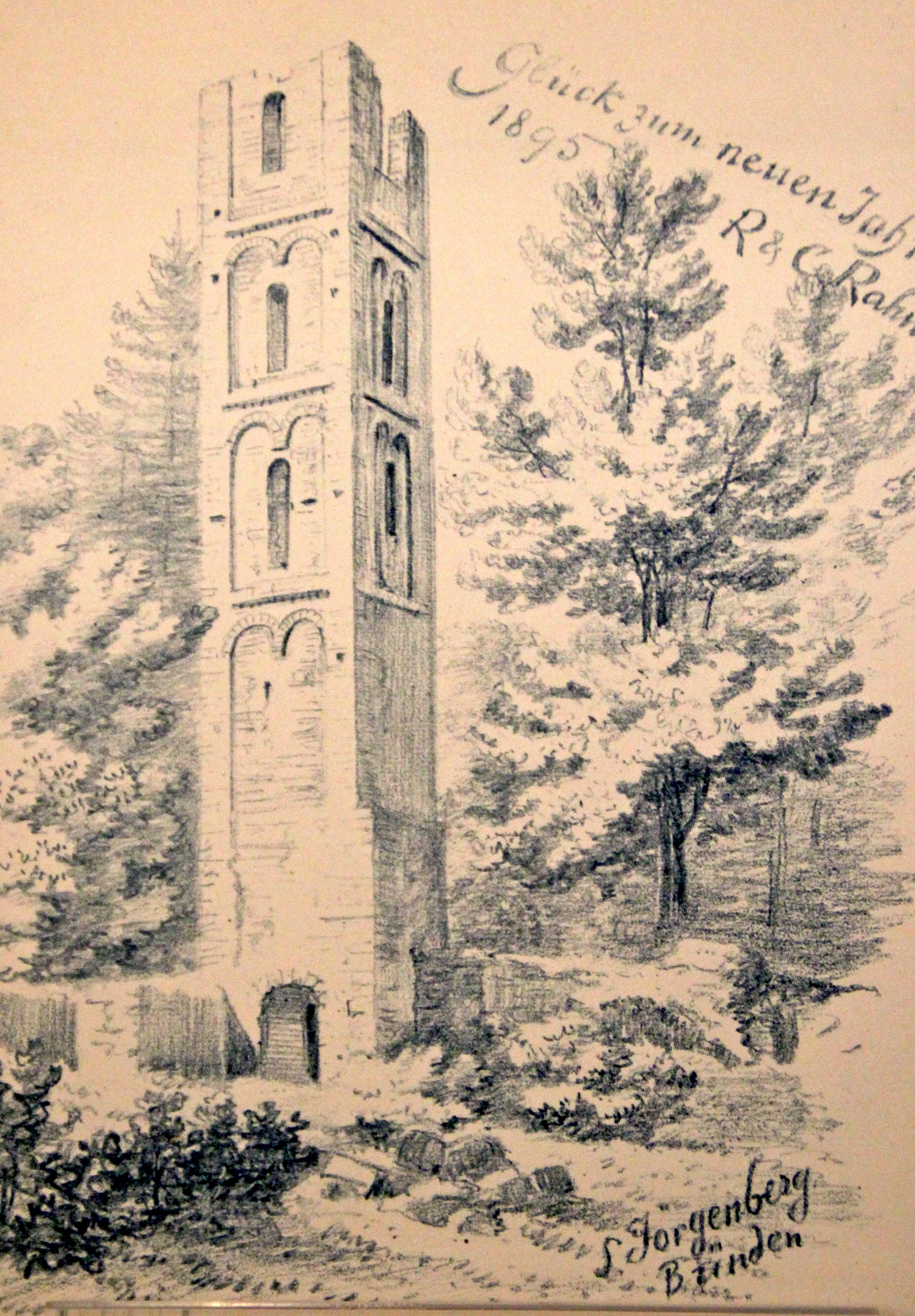 Johann Rudolf Rahn: Neujahrskarte für das Jahr 1895. Turm der Kirche in der Burg Jörgenberg (Waltensburg)